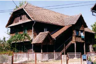 Čardak u naselju kraj Velike Gorice, Mraclinu.